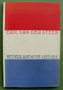 Omslag van het boek Nederlandsche liedjes van de Nederlandse schrijver Eric van der Steen. Het ontwerp is in 1932 gemaakt door Andries Oosterbaan (1882-1935). Zie Lex van de Haterd: 'Van boekbinder tot grafisch vormgever'. In: Zacht Lawijd 3: 1 (2003)